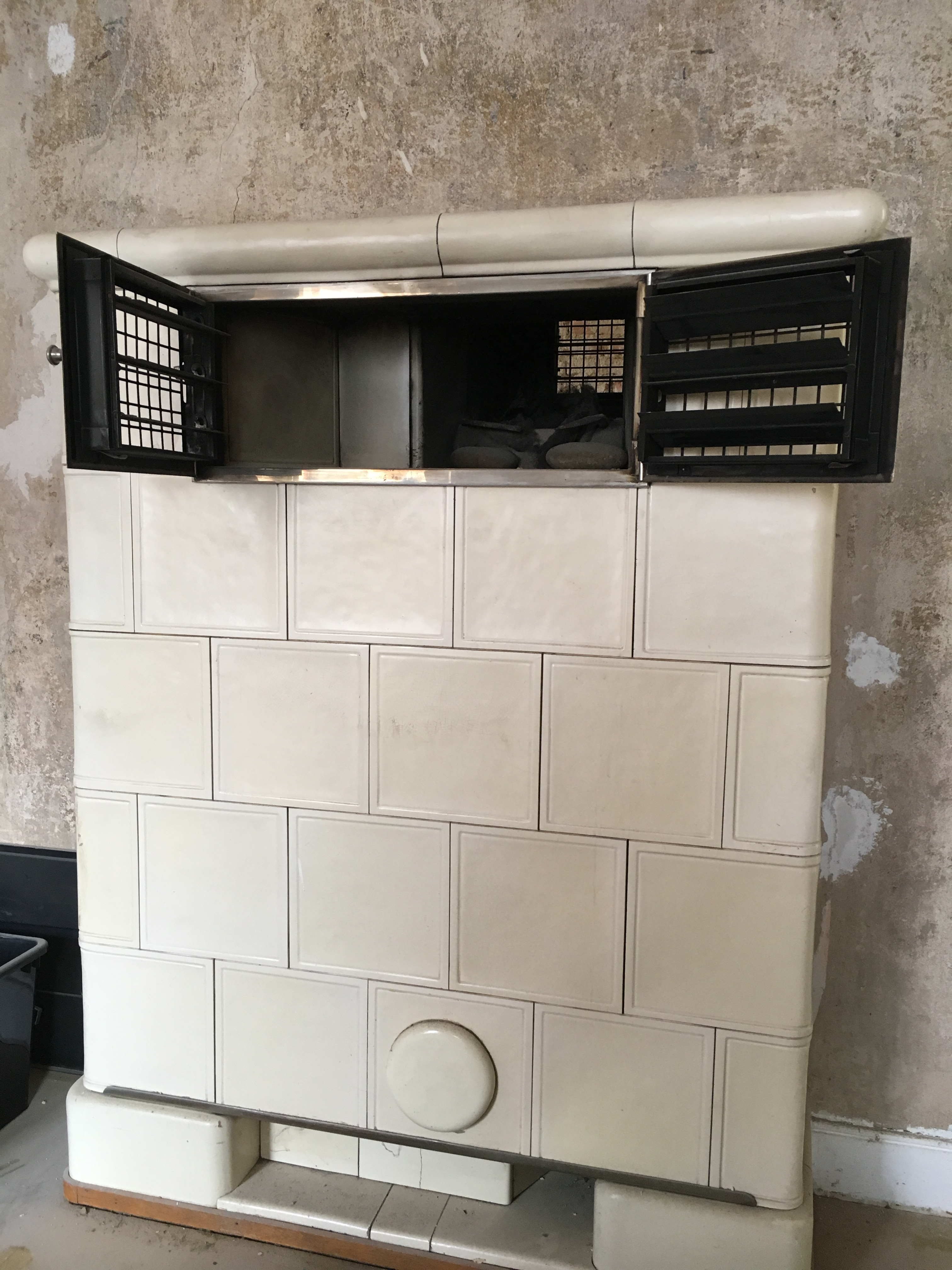 Kachelofen als Wärmequelle und -speicher, der über eine Warmluftheizung versorgt wird. Unten zu erkennen die Öffnung, über die kalte Raumluft angesaugt und zur Heizung zurück geleitet wird.